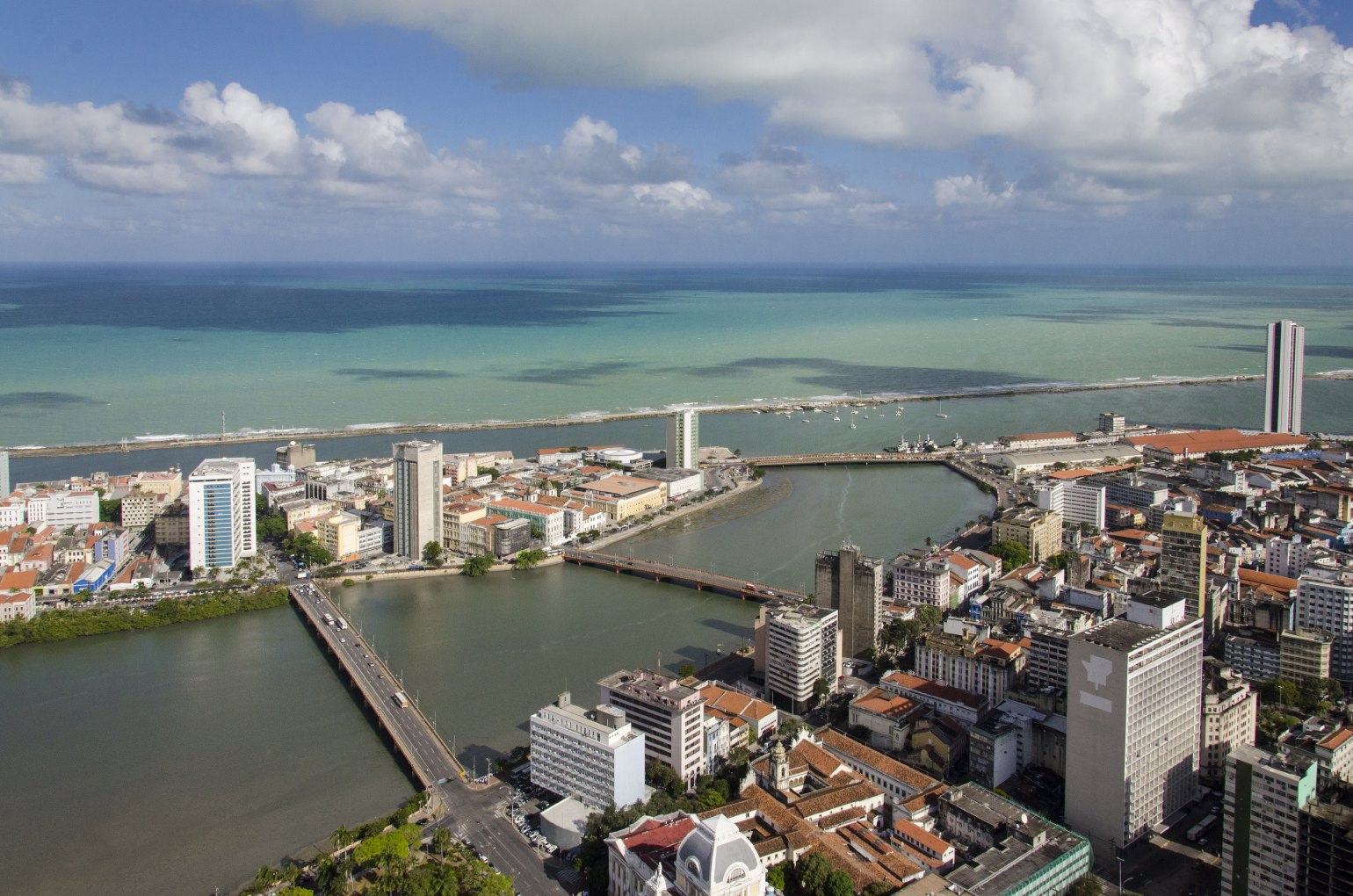 Recife, PE - Obras de Mobilidade. (Foto: Portal da Copa/Divulgação)